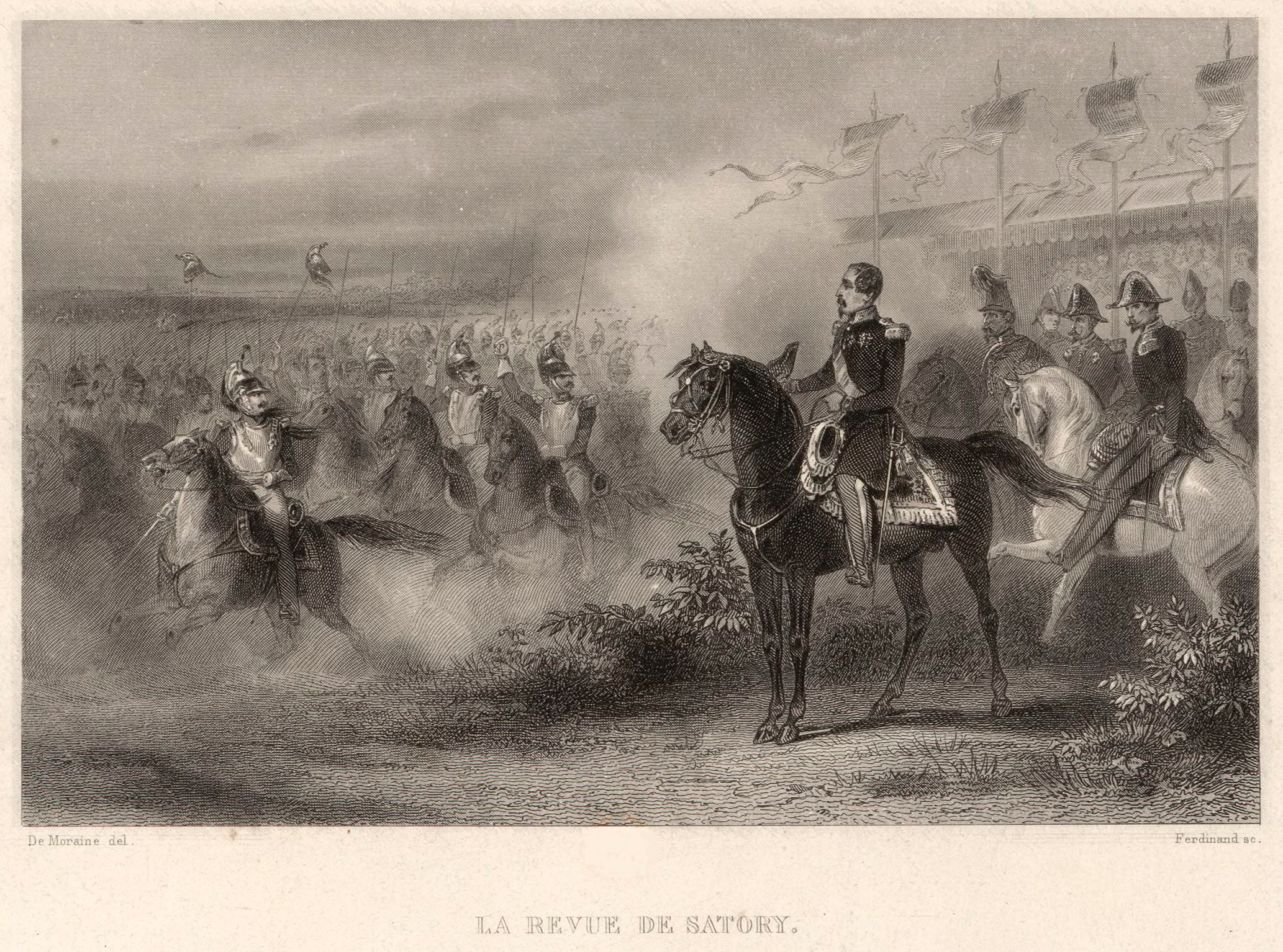 La revue de Satory, estampe de Ferdinand Delannoy, vers 1850-1851 [1].